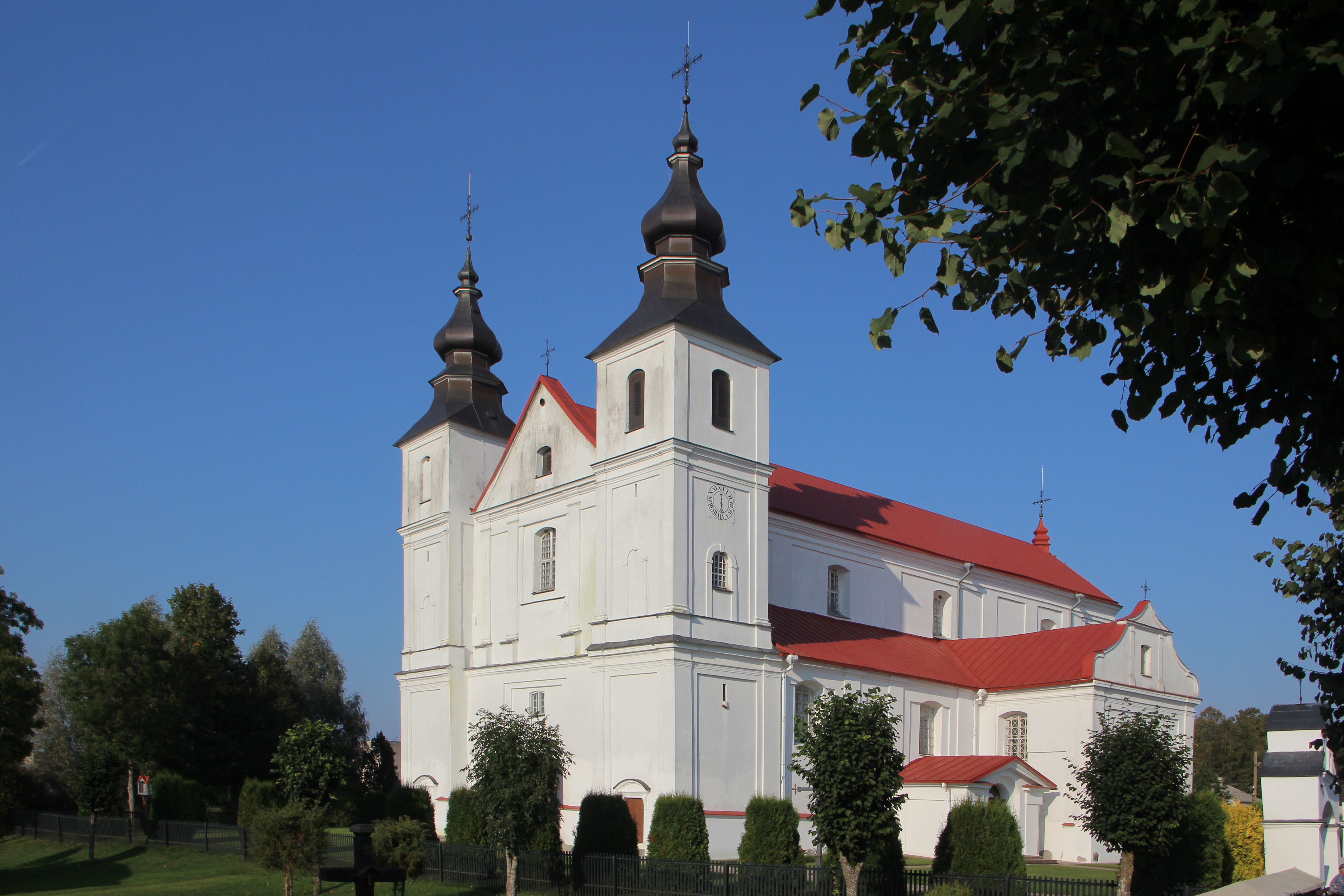 Wornie (lit. Varniai) - miasto w okręgu telszańskim na Litwie.